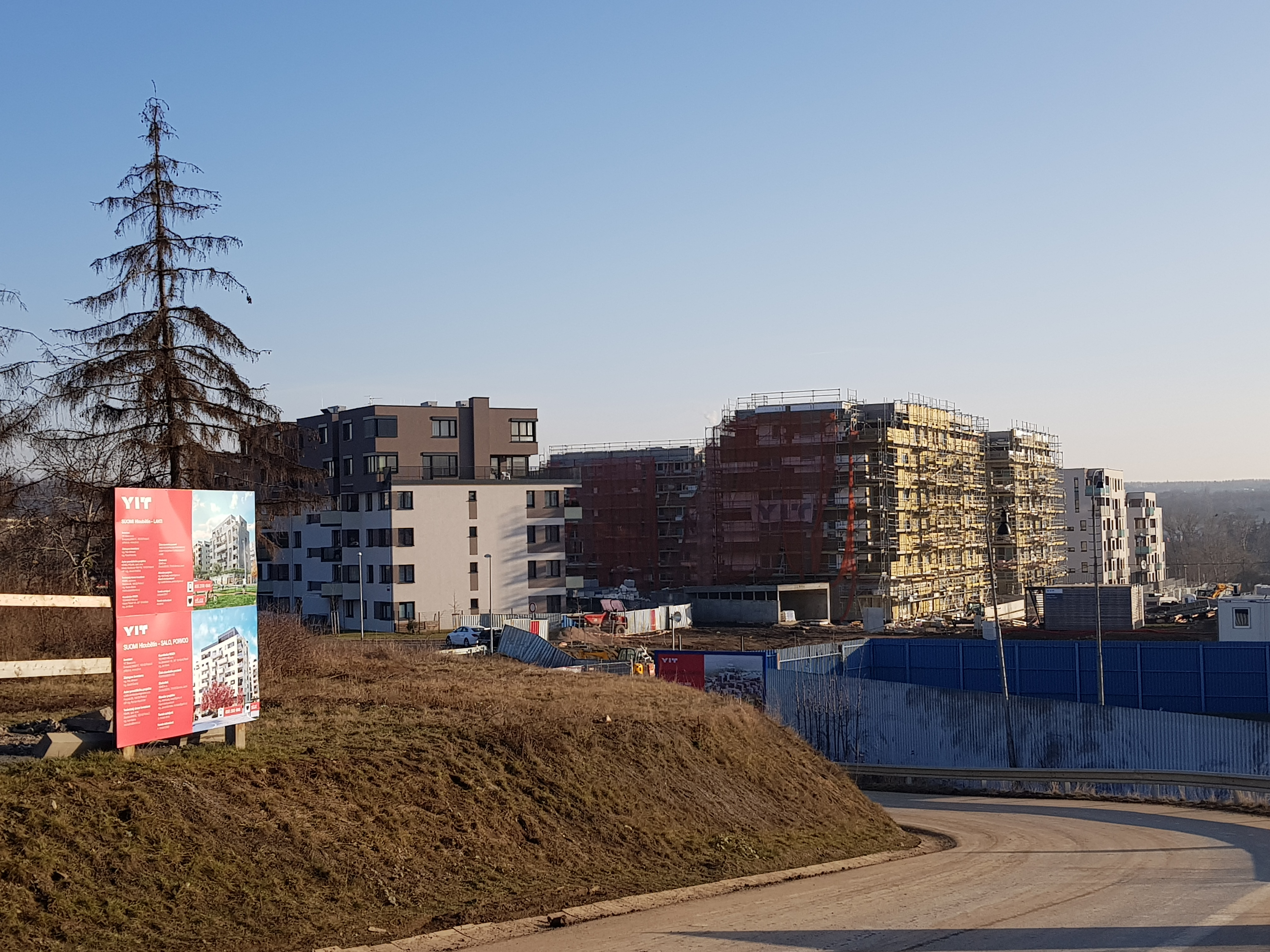 Suomi Hloubětín, Praha 9, pohled z Kolbenovy.